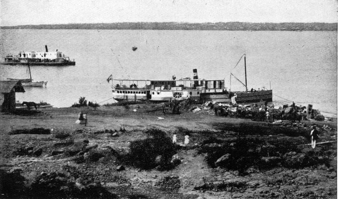 Posadas, Misiones, 1892. Excursion Científica por los ríos Paraguay, Alto Paraná e Iguazú, en 1892